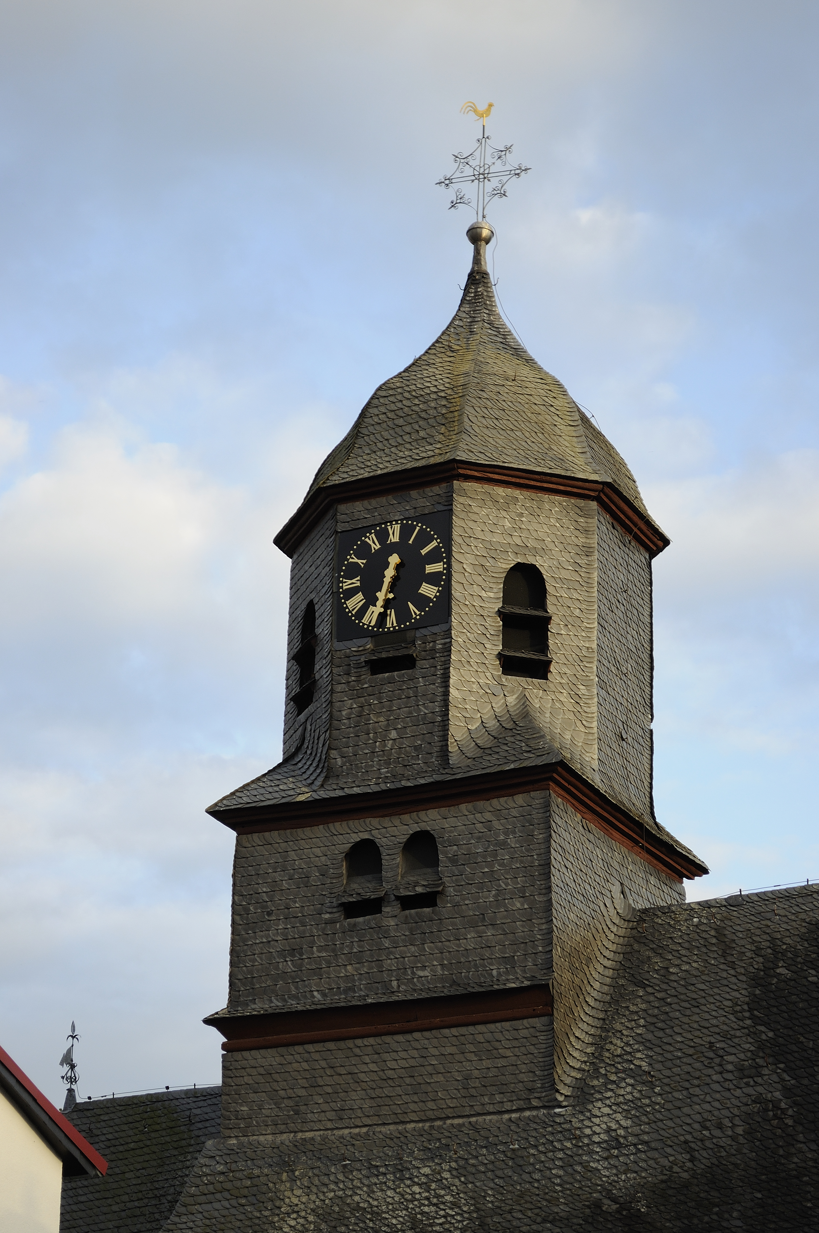 Dieses Foto entstand im Rahmen des Projekts Wiki Loves Monuments Mittelhessen, das aus dem Community-Projektbudget von Wikimedia Deutschland e. V. gefördert wurde.